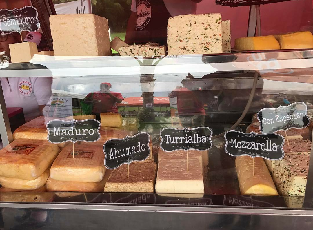 Versión jpg del archivo Archivo:Quesos de Costa Rica.png